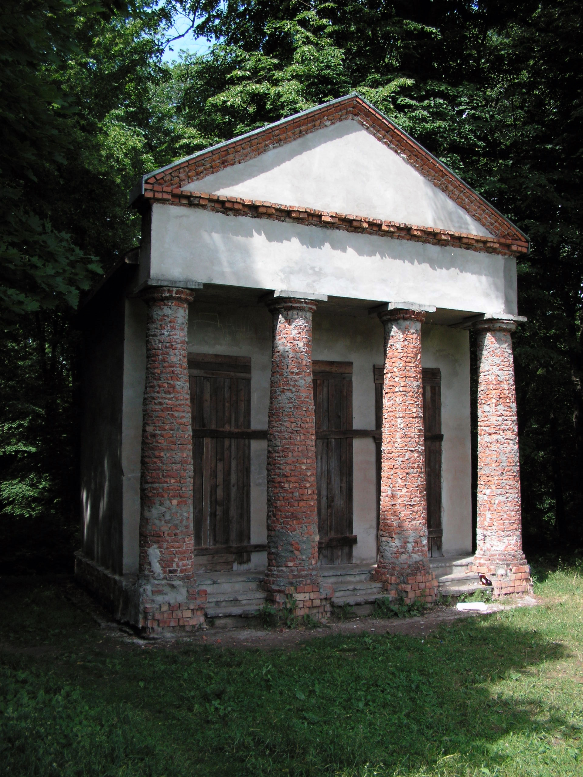 Беларуская (тарашкевіца): Сядзіба Міхала Клеафаса Агінскага ў Залесьсі (Смаргонскі раён). Лета 2011